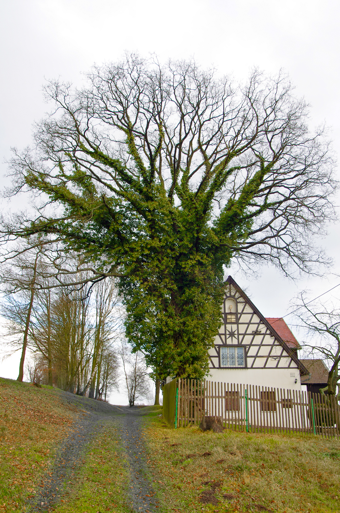 Chlum Svaté Maří, okres Sokolov, památný strom - Šenbauerův dub; vysoký kmen, hustě zavětvená koruna; kmen a větší část koruny jsou značně porostlé plodným břečťanem popínavým, výška 21 m, obvod kmene 353 cm (údaje z roku 2003)